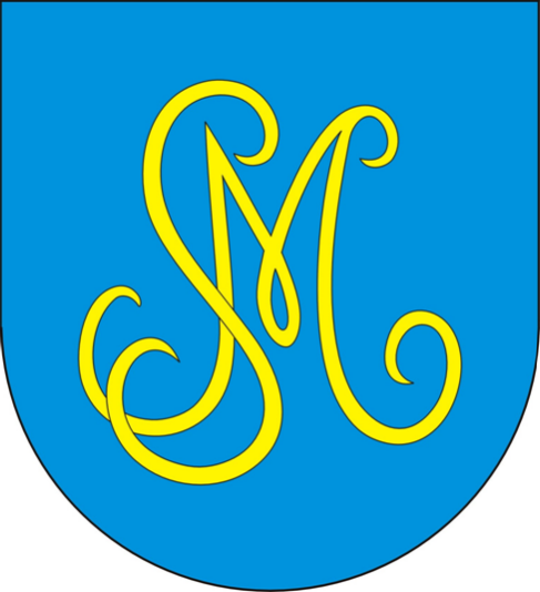 Herb gminy Białaczów